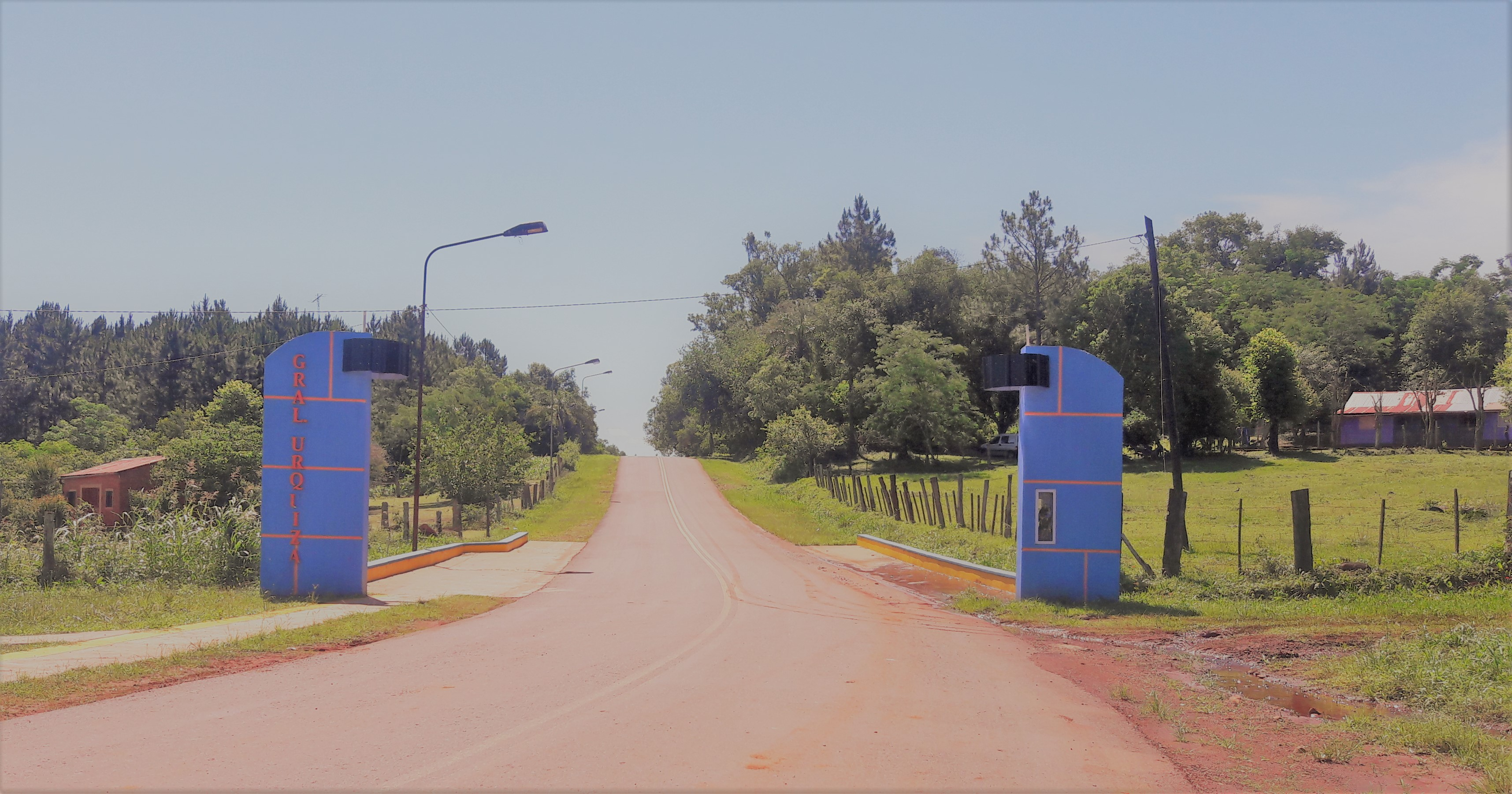 Acceso desde la Ruta Nacional 12 a General Urquiza (Provincia de Misiones). Fuenteː Periodista Horacio Cambeiro.